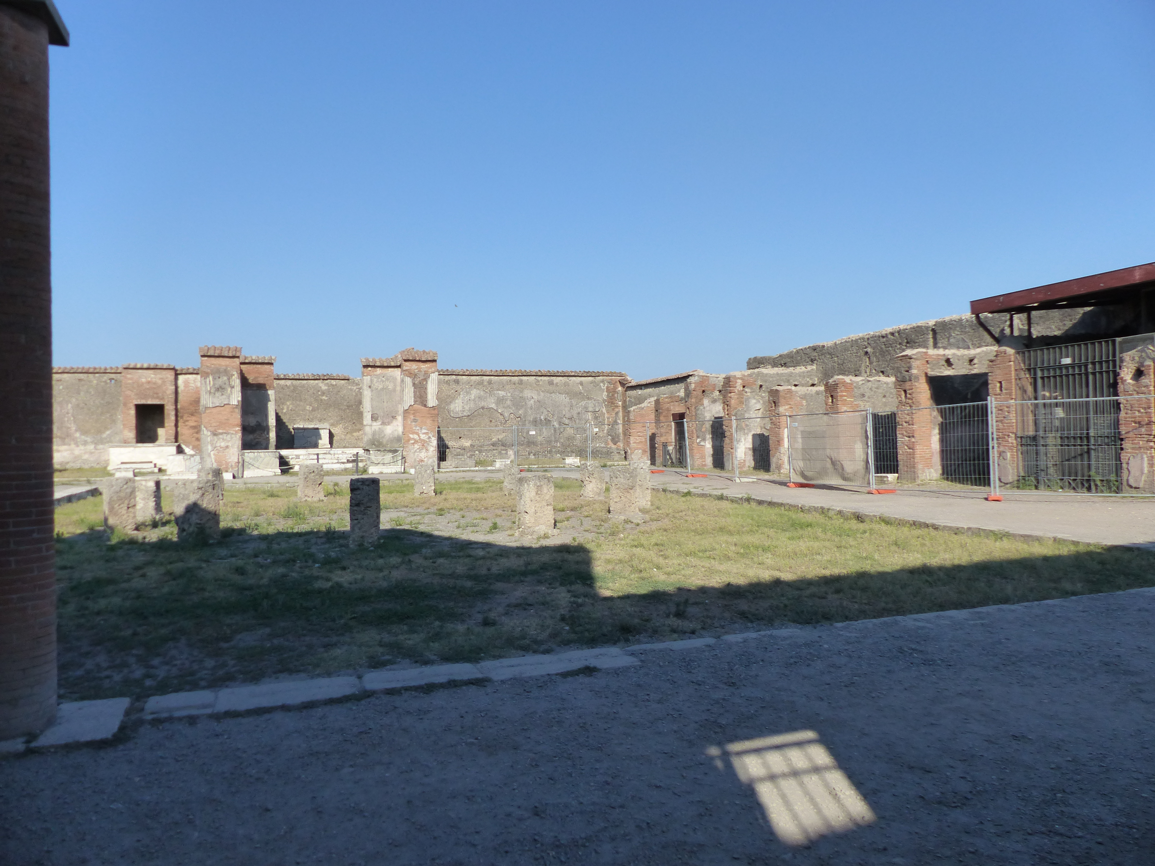 Macellum de Pompeya